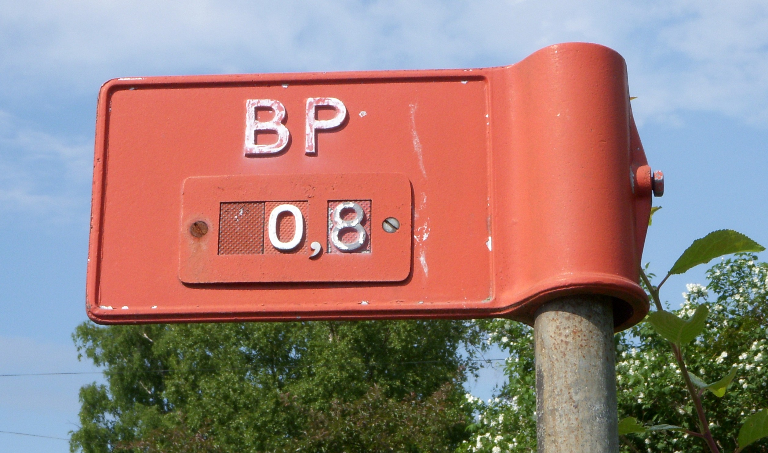 Skylt "Brandpost" (BP) i Stockholm